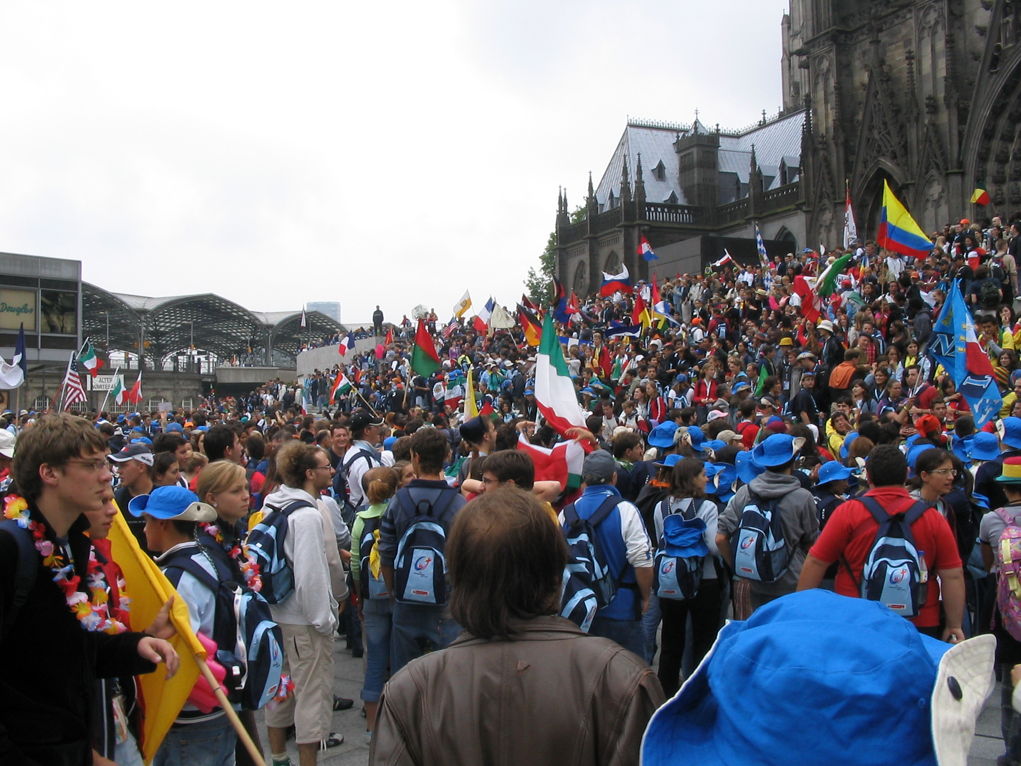 Pilger in Köln während des Weltjugendtages 2005